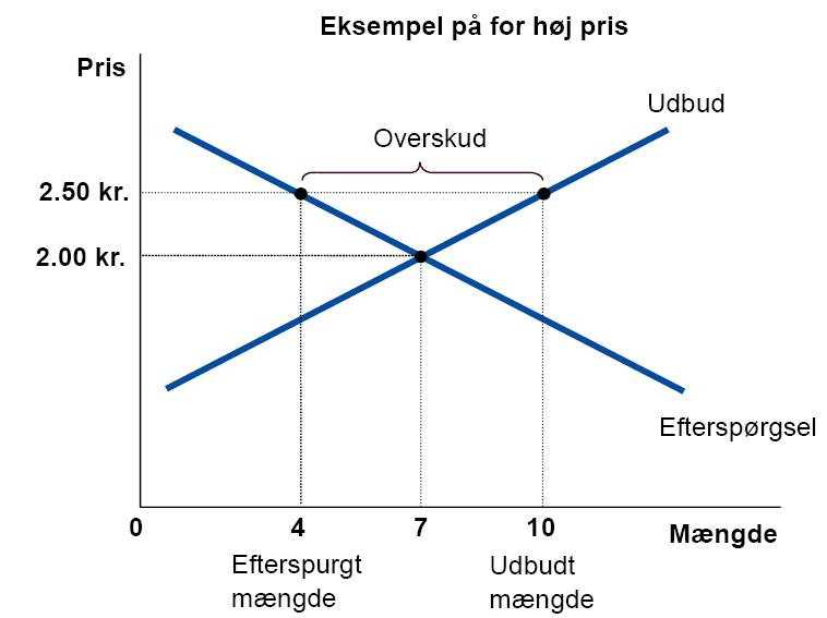 Eksempel på overskud ved for stor produktion på grund af for høj pris